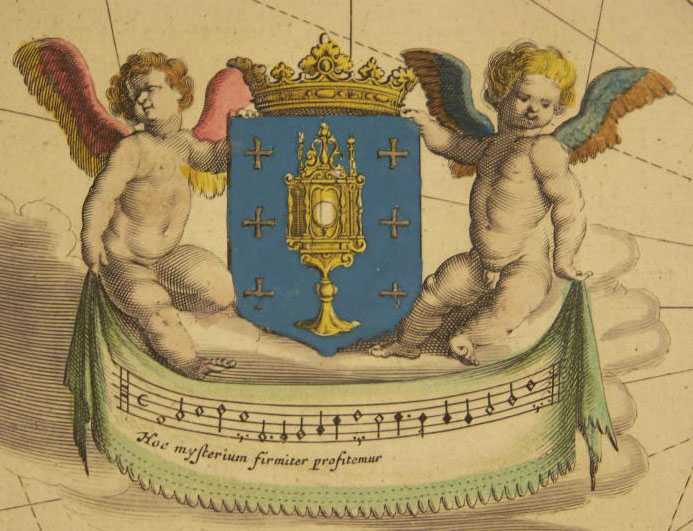 Detalle de un mapa cartográfico hecho por Ioannes Baptista Vrints (s.XVI), en el que se representa el escudo de Galicia junto a dos ángeles.